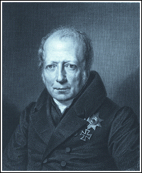 威廉·馮·洪堡 自柏林洪堡大學網站取得 （英文版wiki也是使用同一來源圖片） 原始網址：